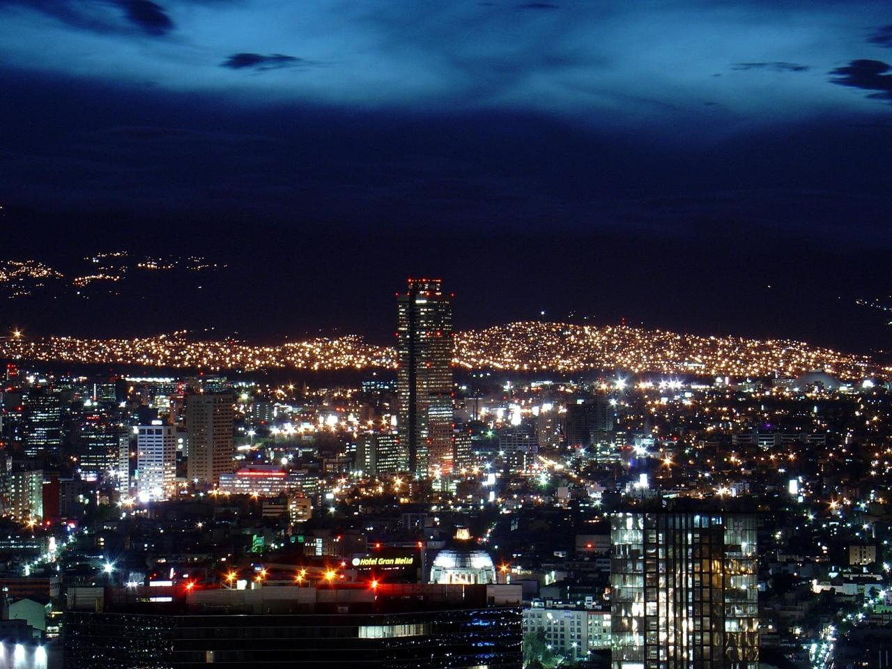 Torre de Pemex